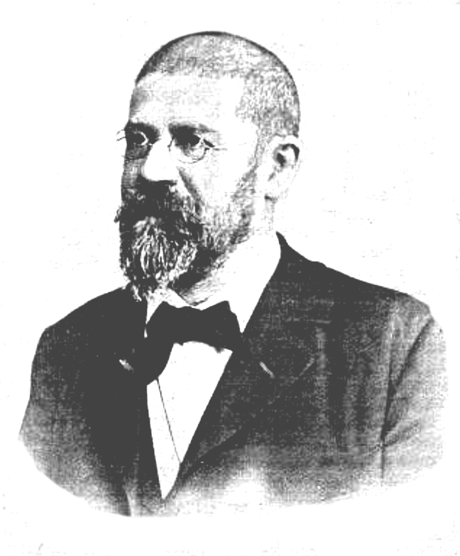 Mediziner, Pharmakognost und Ordinarius.